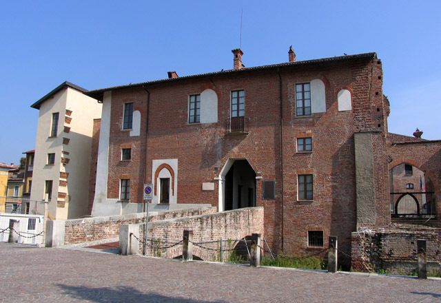 Castello Visconteo - Abbiategrasso 09/2006